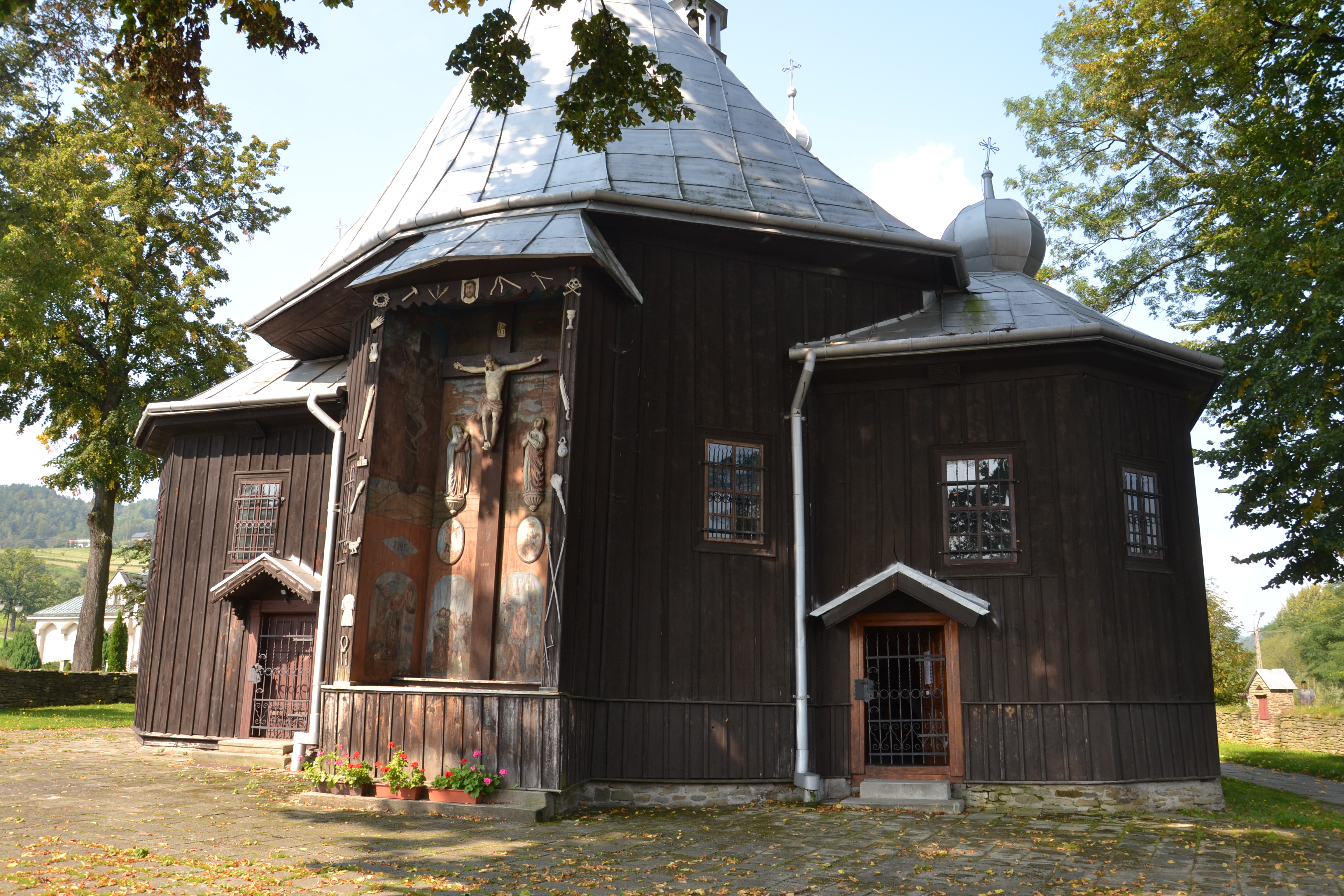 Łukowica, zespół kościoła par. p.w. św. Andrzeja Apostoła